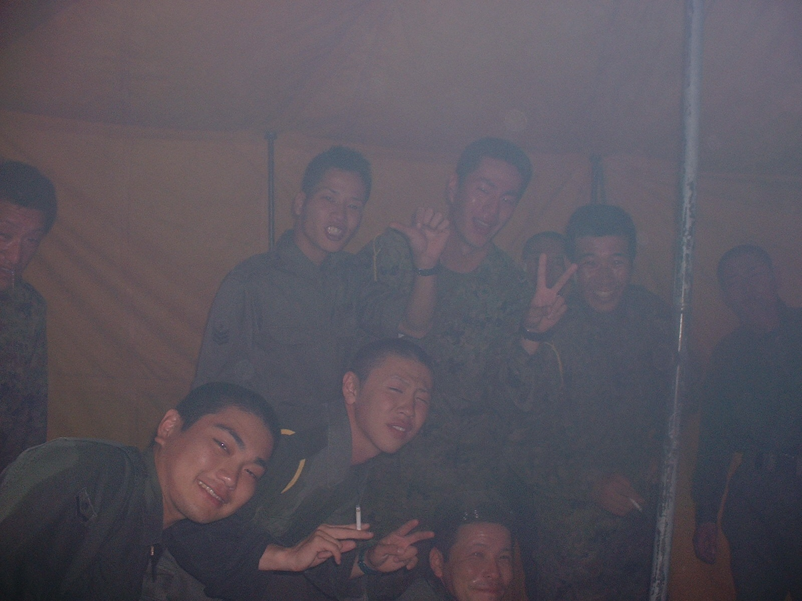 天幕内におけるガス体験の様子、写真右側で肩に黄色い紐を通しておりタバコを手にしているのが投稿者自身（撮影は近くにいた新隊員に撮らせました）。 皆涙目である事がお分かりかと思います。